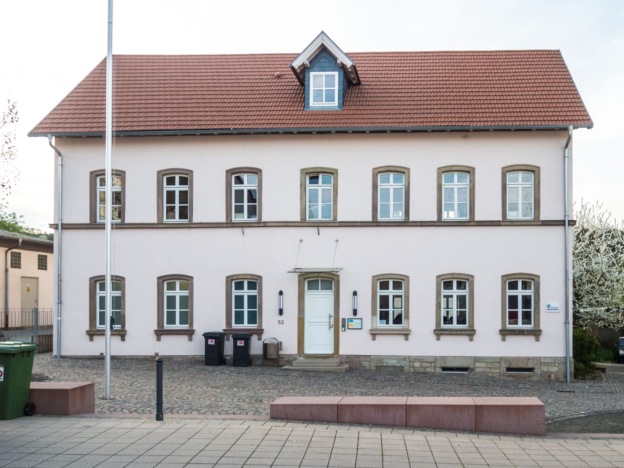 Winnweiler, Südostansicht des denkmalgeschützten Gebäudes Schlossstraße 53